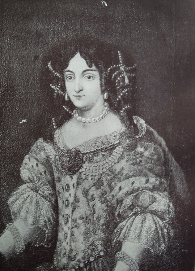 Zrínyi Ilona